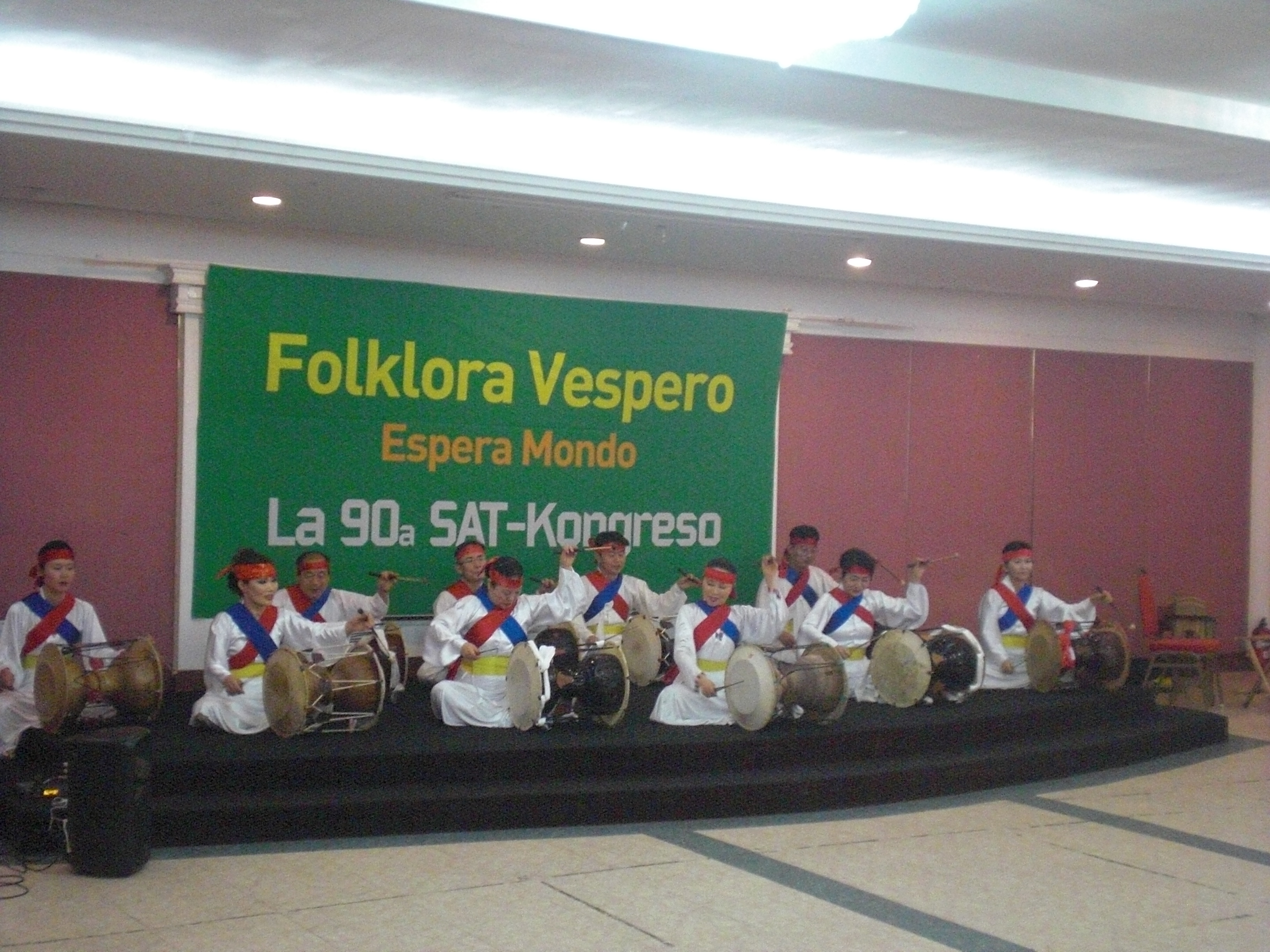 Espera Mondo en 90-a SAT-Kongreso